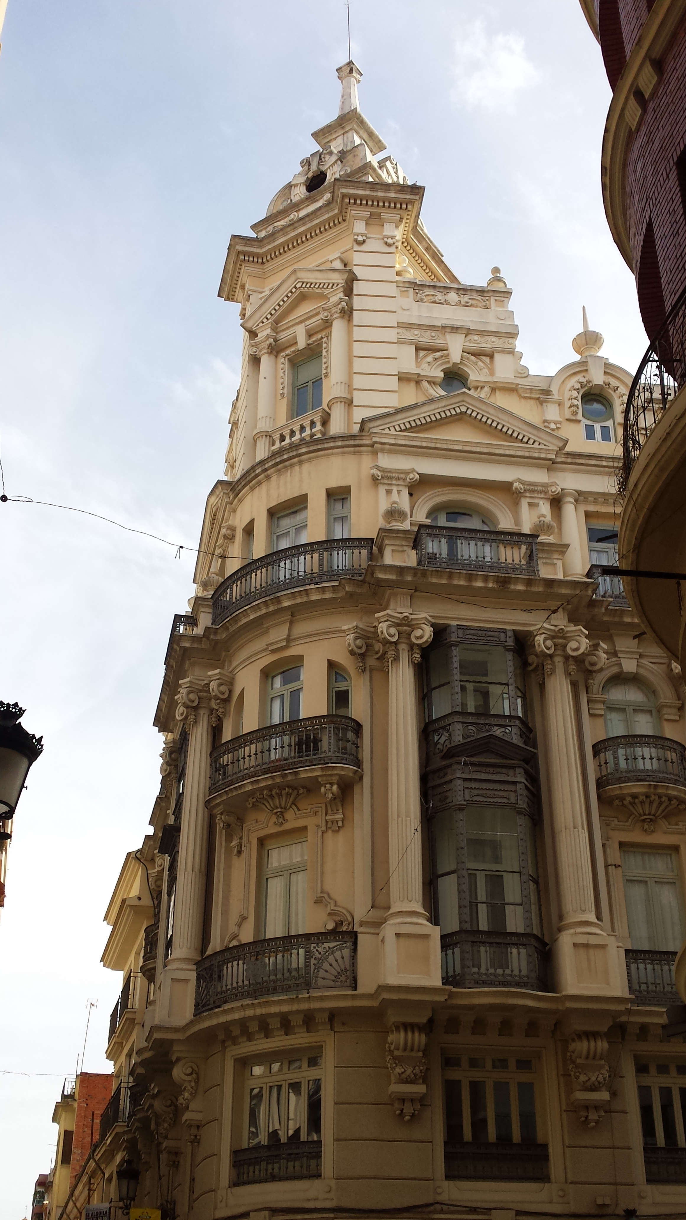 Edificio Banesto. Casa de D. Juan Núñez. Calle Tesifonte Gallego. Calle Ancha. Centro. Albacete